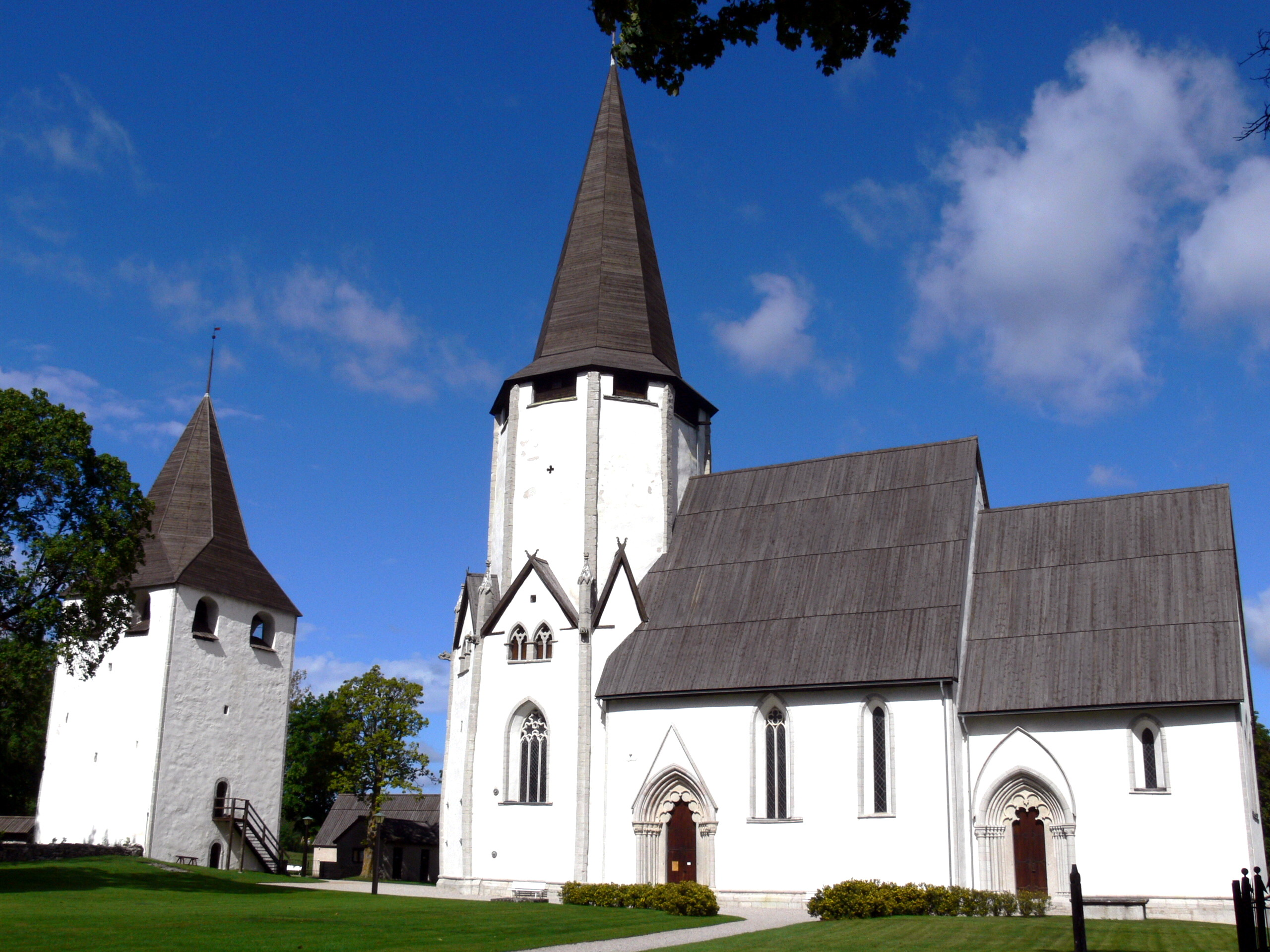 Lärbro kyrka auf Gotland. Kirche mit Kastell